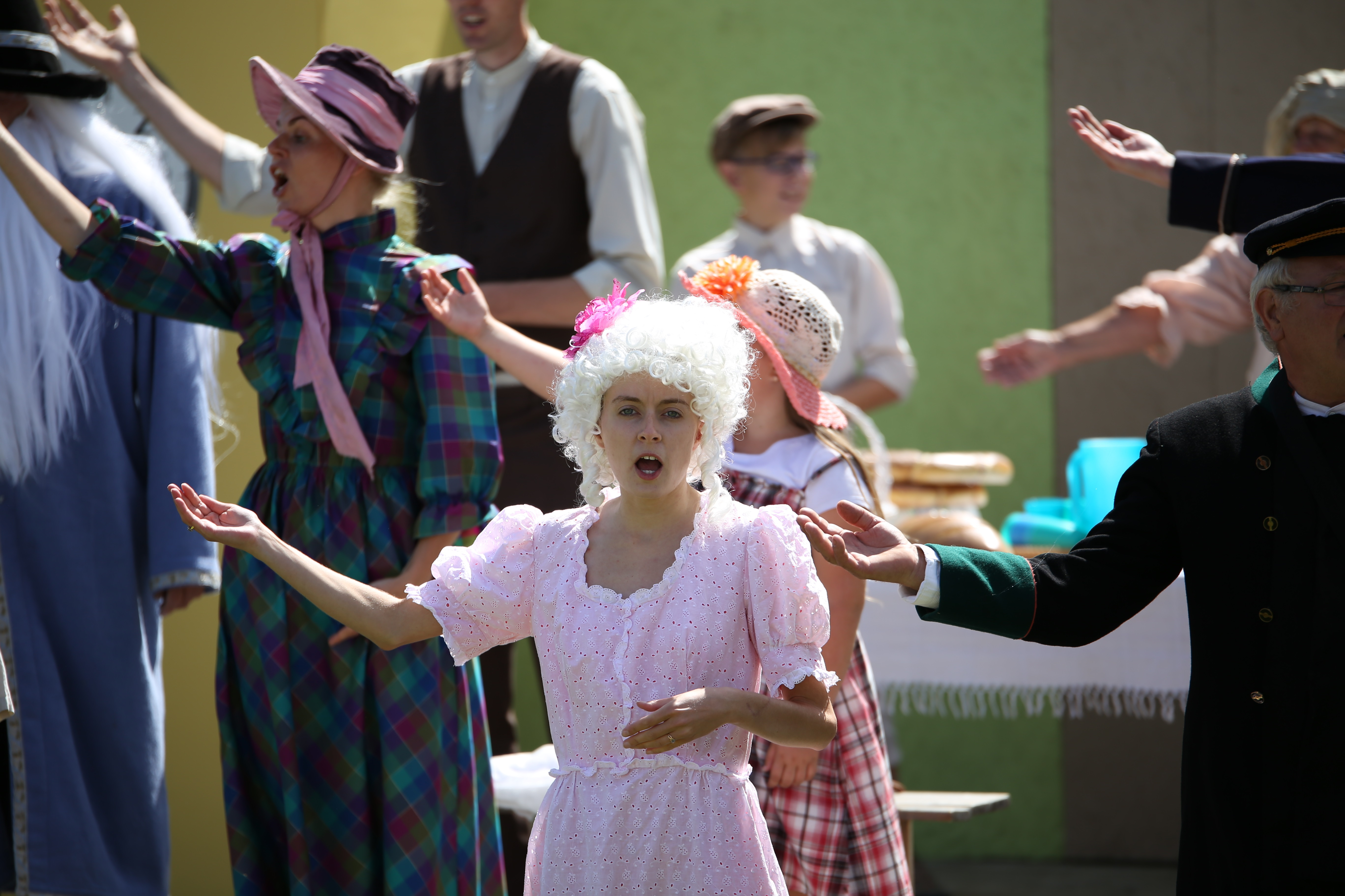 Ingrid Ulsti lavastus